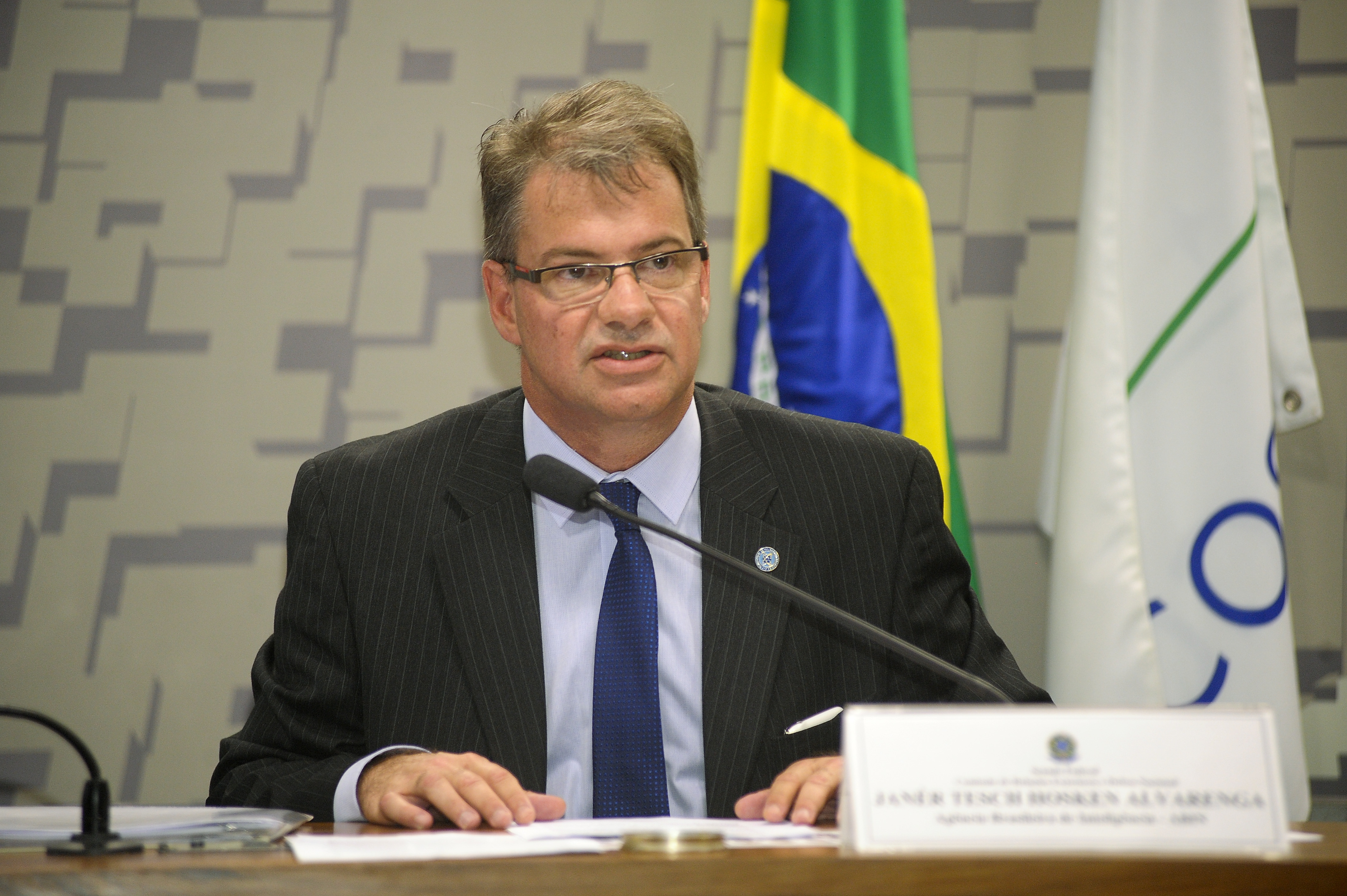 Comissão de Relações Exteriores (CRE) realiza sabatina do indicado para diretor-geral da Agência Brasileira de Inteligência (Abin), de Janér Tesch Hosken Alvarenga. Mesa (E/D): indicado para diretor-geral da Agência Brasileira de Inteligência (Abin), de Janér Tesch Hosken Alvarenga; presidente da CRE, senador Aloysio Nunes Ferreira (PSDB-SP). Foto: Waldemir Barreto/Agência Senado